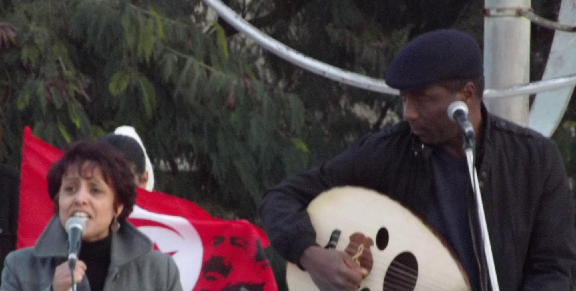 Amel Hamrouni et Khmais, membres de la troupe Recherche musicale de Gabès, qui jouent dans une manifestation suite à l'assassinat de Chokri Belaïd